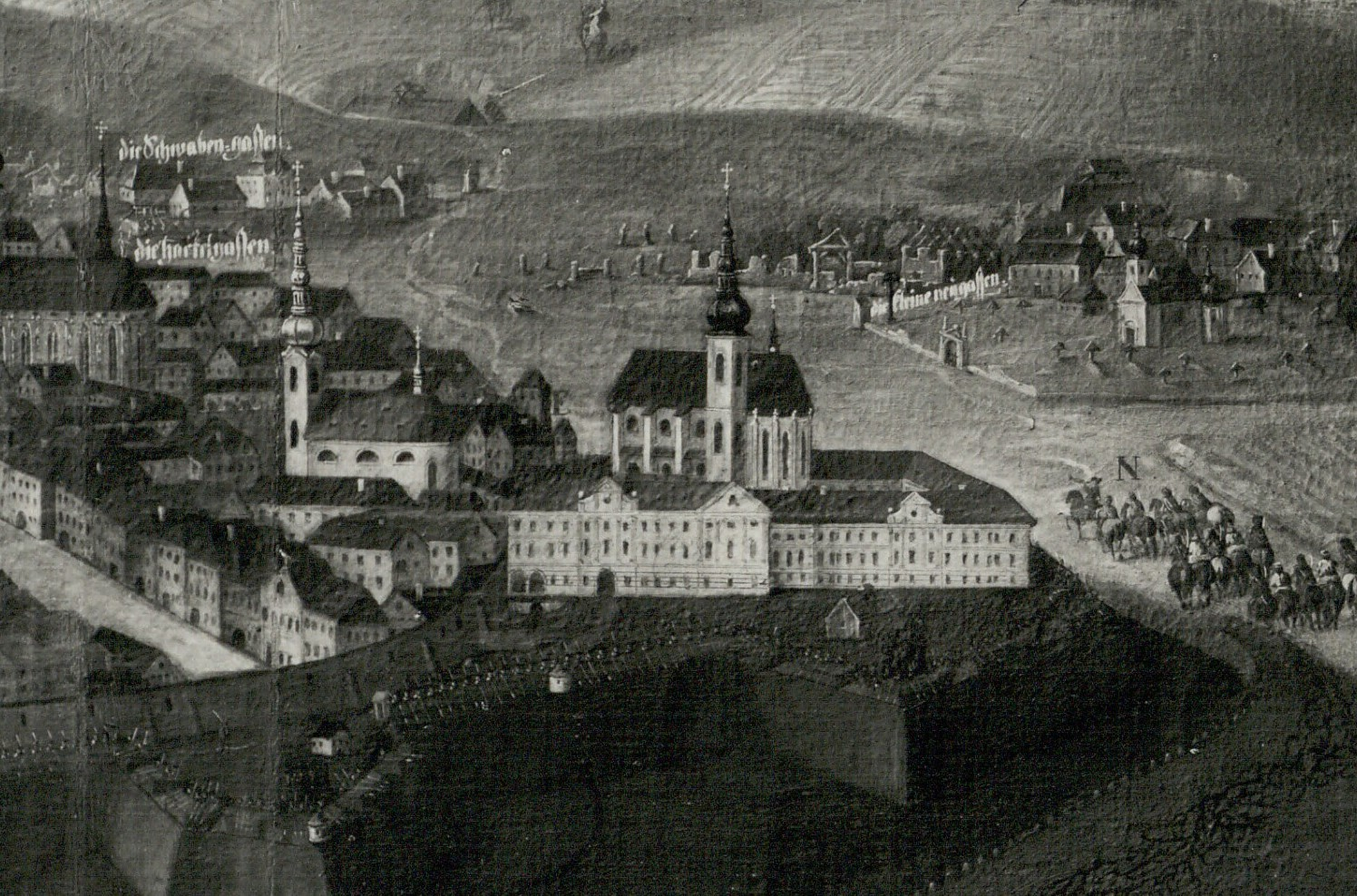 Veduta Brna vyobrazujíce obléhání města pruským vojskem roku 1742. Autor neznámý.